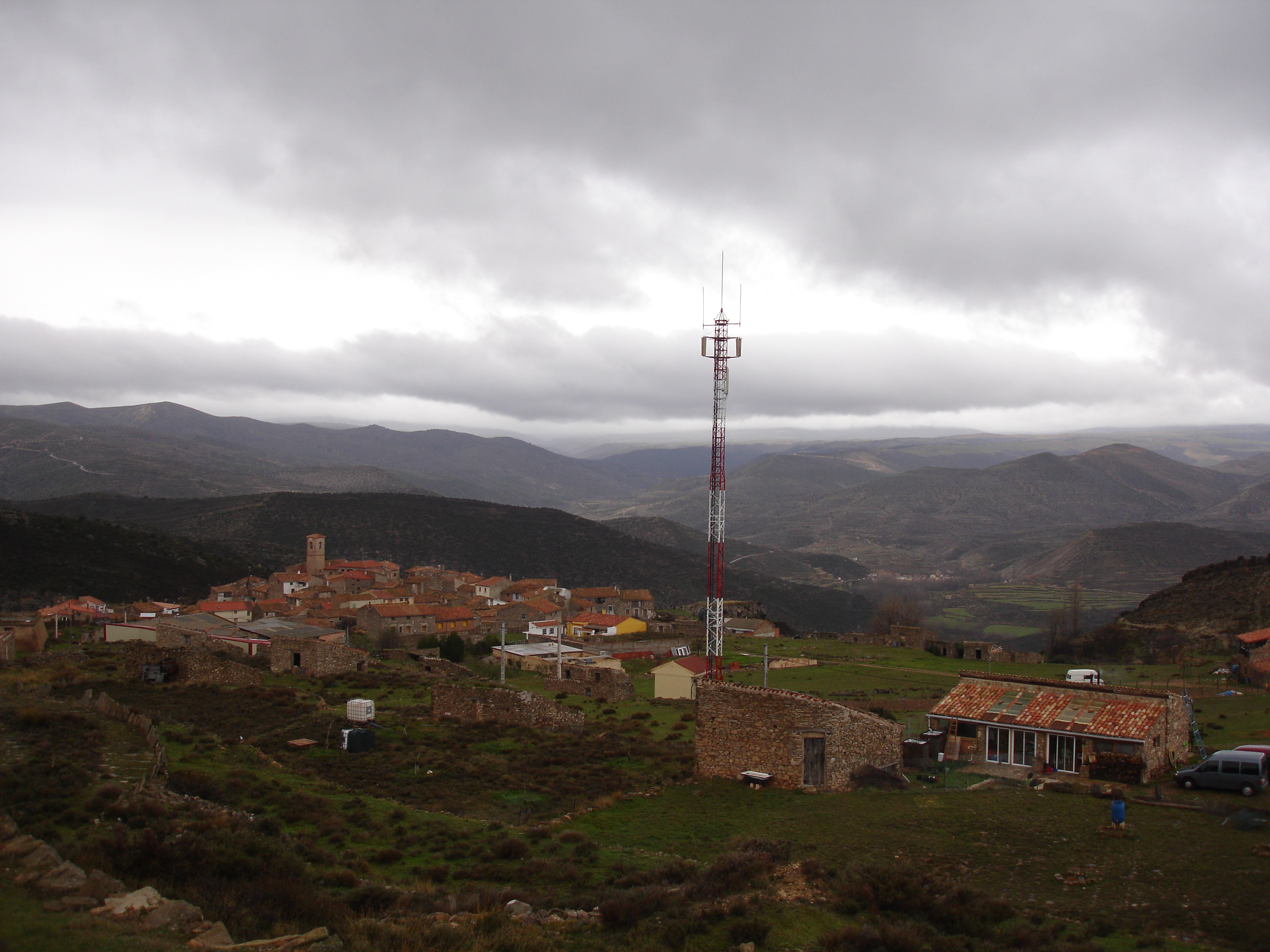 Vista del pueblo de San Felices (pronvica de Soria) desde lo alto del pueblo.